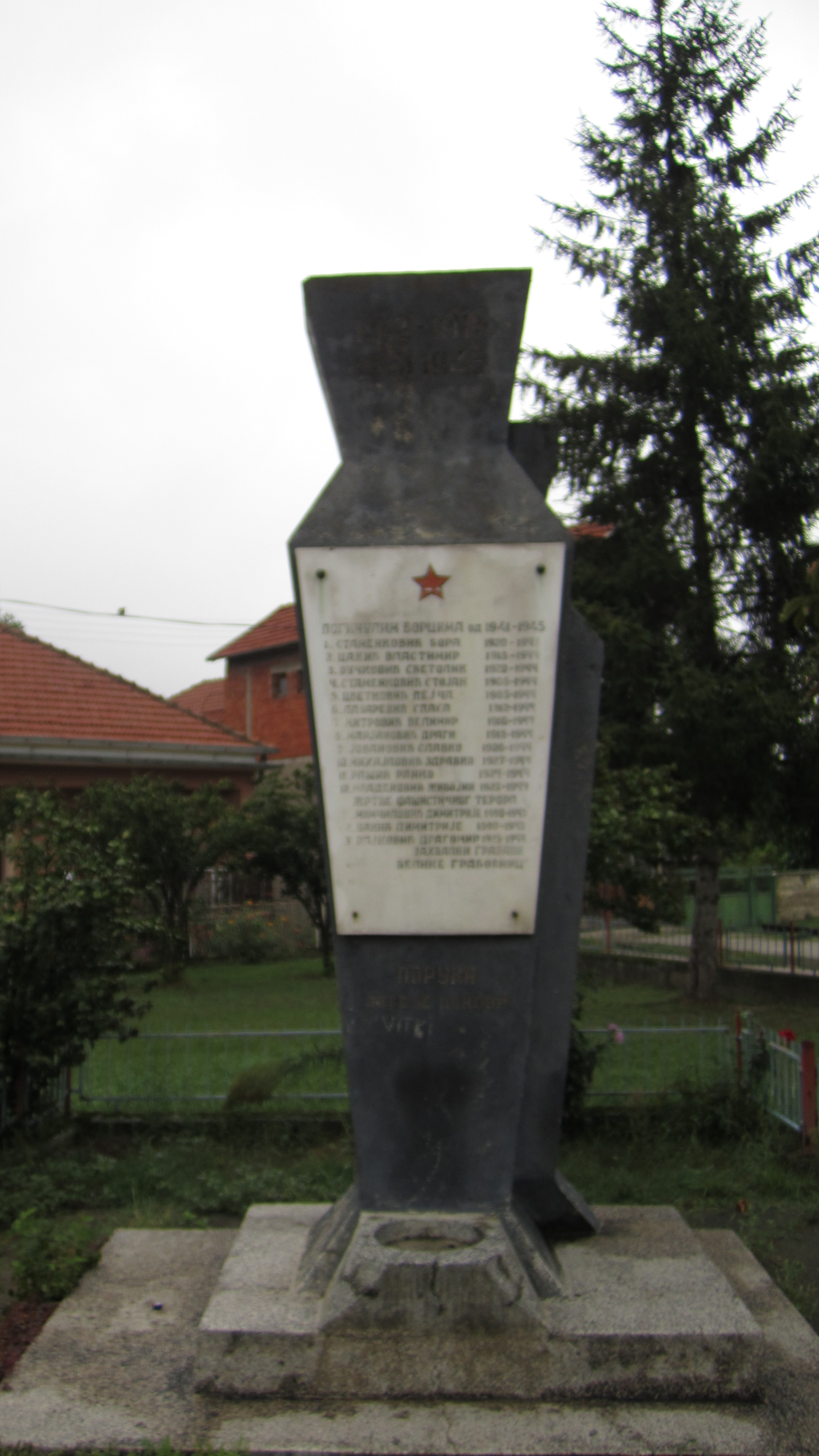 Srpski (latinica): Velika Grabovnica, Leskovac